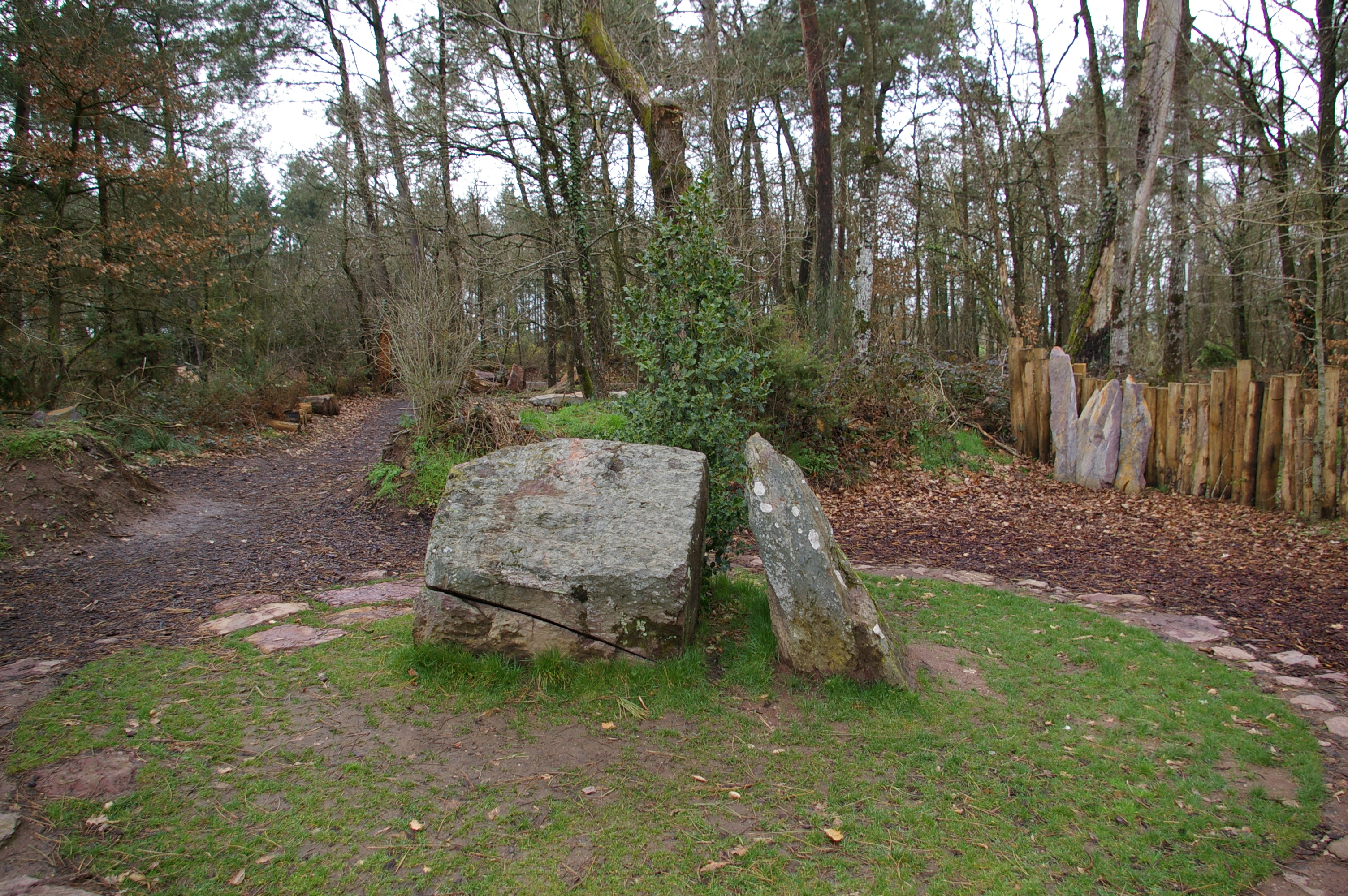 Le Tombeau de Merlin dans la forêt de Brocéliande (Paimpont, Ille-et-Vilaine, France).